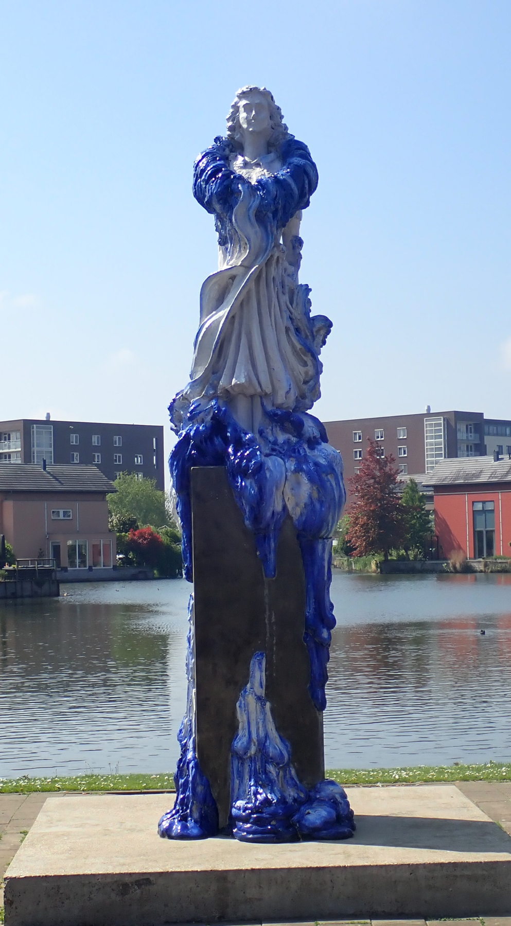 Barendrecht, Havenhoofd. Kunstwerk "Landschappelijke dimensie" van Anne Wenzel. The Netherlands. The photographical reproduction of this work is covered under the article 18 of the Dutch copyright law, which states that “it is not an infringement of copyright to reproduce and publish pictures of a work, as meant in article 10, first paragraph, under 6°[1] or of an architectural work as meant in article 10, first paragraph, under 8°[2], which are made to be permanently located in a public place, as long as the work is depicted as it is located in the public space. Where incorporation of a work in a compilation is concerned, not more than a few of the works of the same author may be included”. [1] drawings, paintings, works of architecture and sculpture, lithographs, engravings and the likes [2] drafts, sketches and three-dimensional works relating to architecture, geography, topography or other sciences Note that photographs are not included in Item 6. They are separately listed at Item 9 and are therefore not covered by FOP. See COM:CRT/Netherlands#Freedom of panorama for more information. .